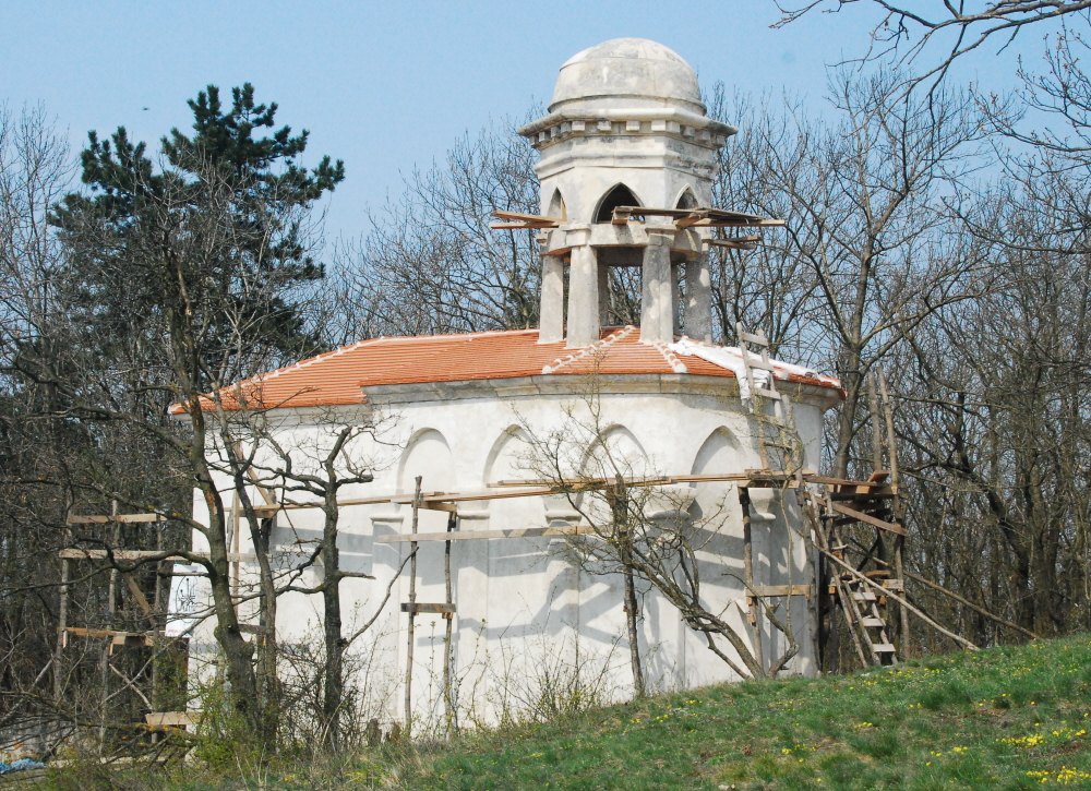 Das Heilige Grab auf dem Heiligen Berg in Mikulov während der Renovierung im April 2010.